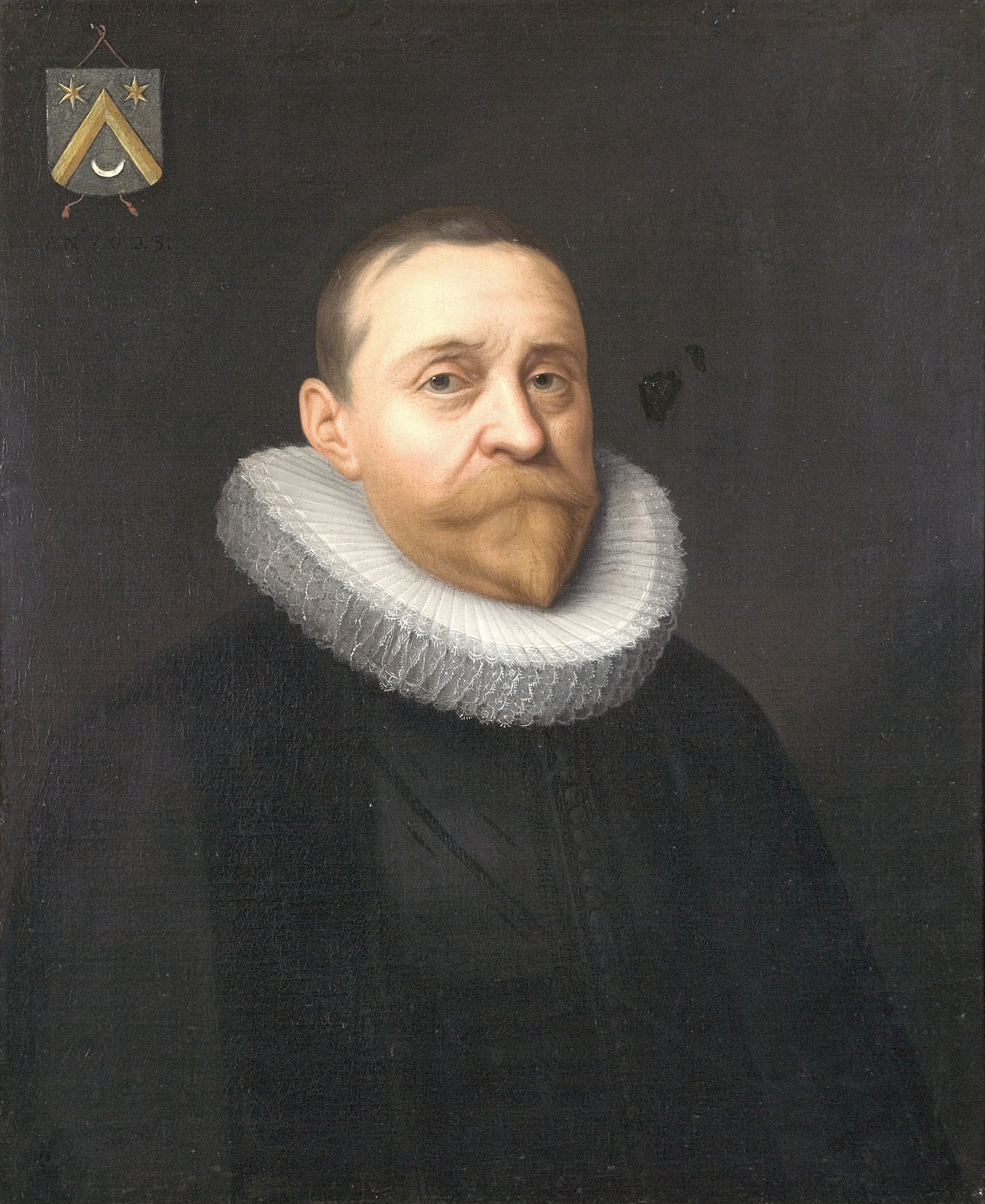 Zwarte buis en mantel, plooikraag met kant, kort donkerblond haar, rode puntbaard en snor.